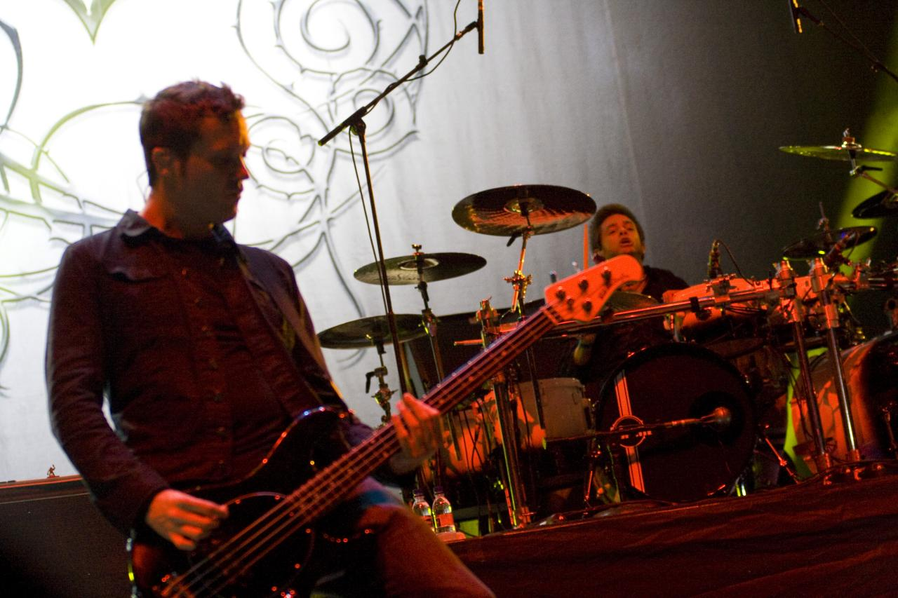 Evanescence @ Maquinaria Festival - 08/11/2009 - São Paulo, Brasil É proibida a cópia ou reprodução deste material sem a autorização do autor. Por favor, não publique nada daqui sem o devido crédito. Fotógrafo: Alexandre Cardoso